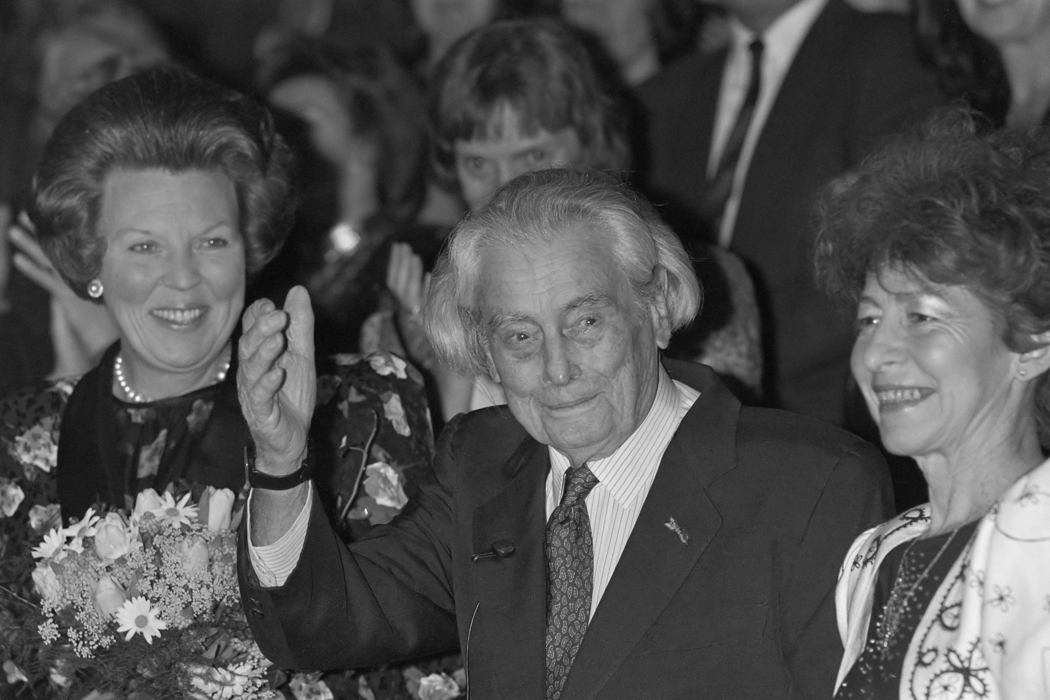 Filmfestival Rotterdam. Van links naar rechts Koningin Beatrix, filmregisseur Joris Ivens en zijn vrouw Marceline Loridan 26 januari 1989